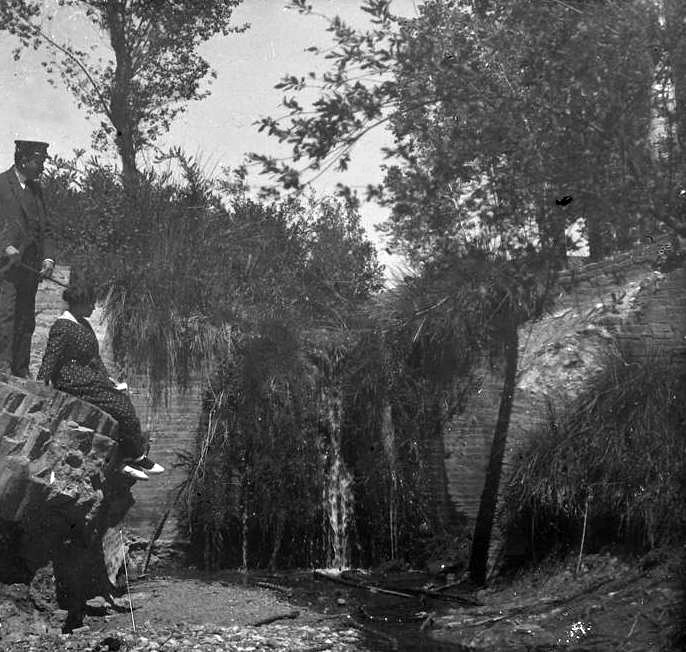 Al torrent de Sant Mús. Josep Salvany i Blanch (1919)